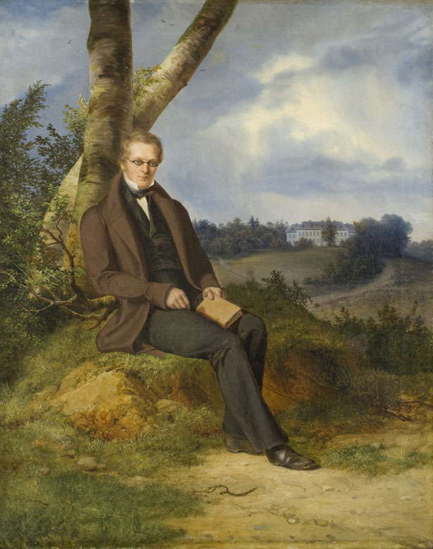 Im Hintergrund Schloss Roland bei Düsseldorf